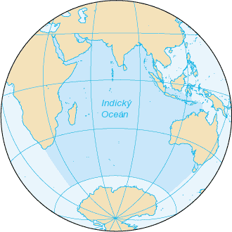 Indický oceán, slovenské popisky Source: sk modifikacia z en verzie Indianocean.PNG This work has been released into the public domain by its author, Julo. This applies worldwide.In some countries this may not be legally possible; if so:Julo grants anyone the right to use this work for any purpose, without any conditions, unless such conditions are required by law.